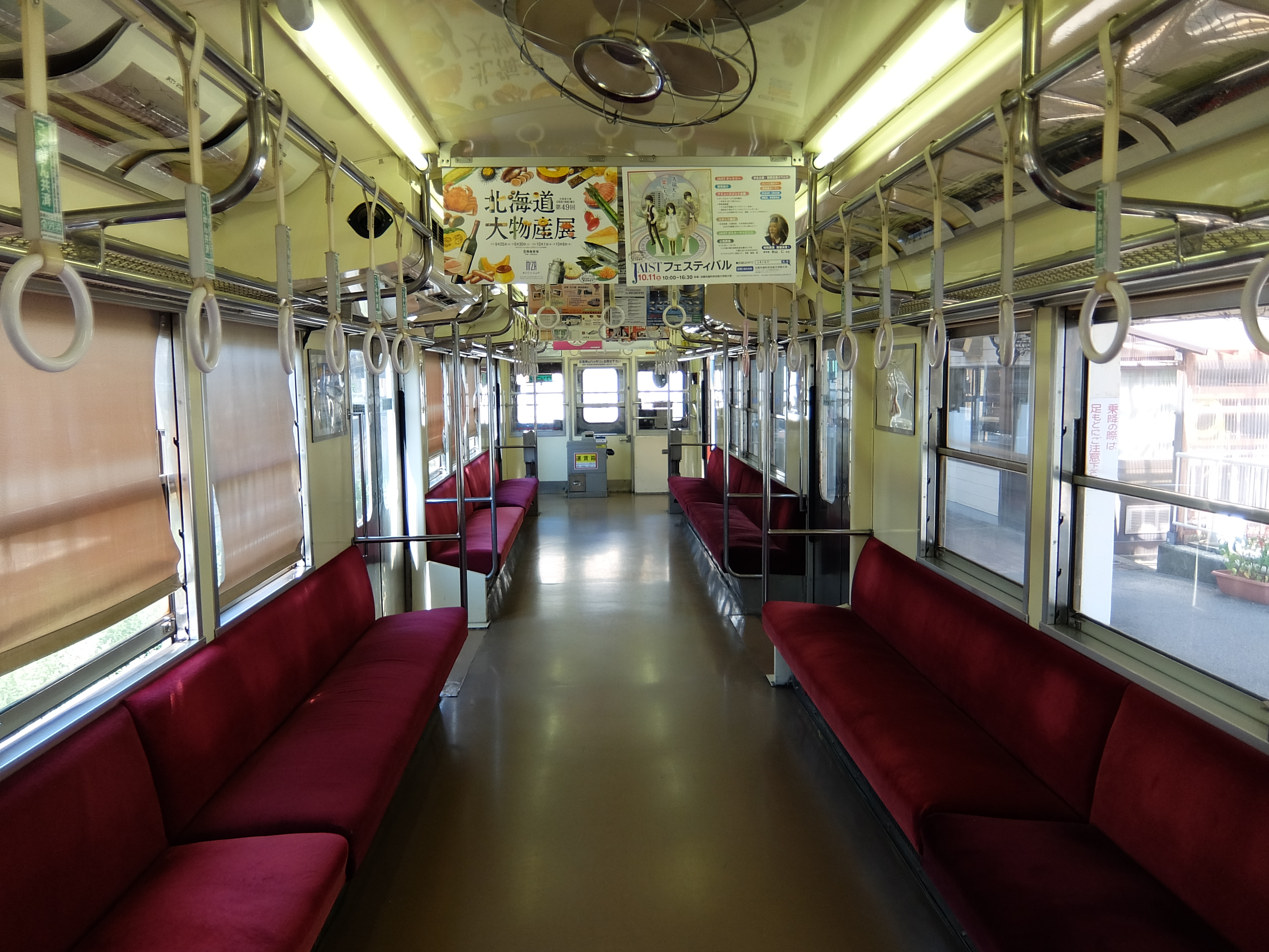 北陸鉄道7000系 車内の様子